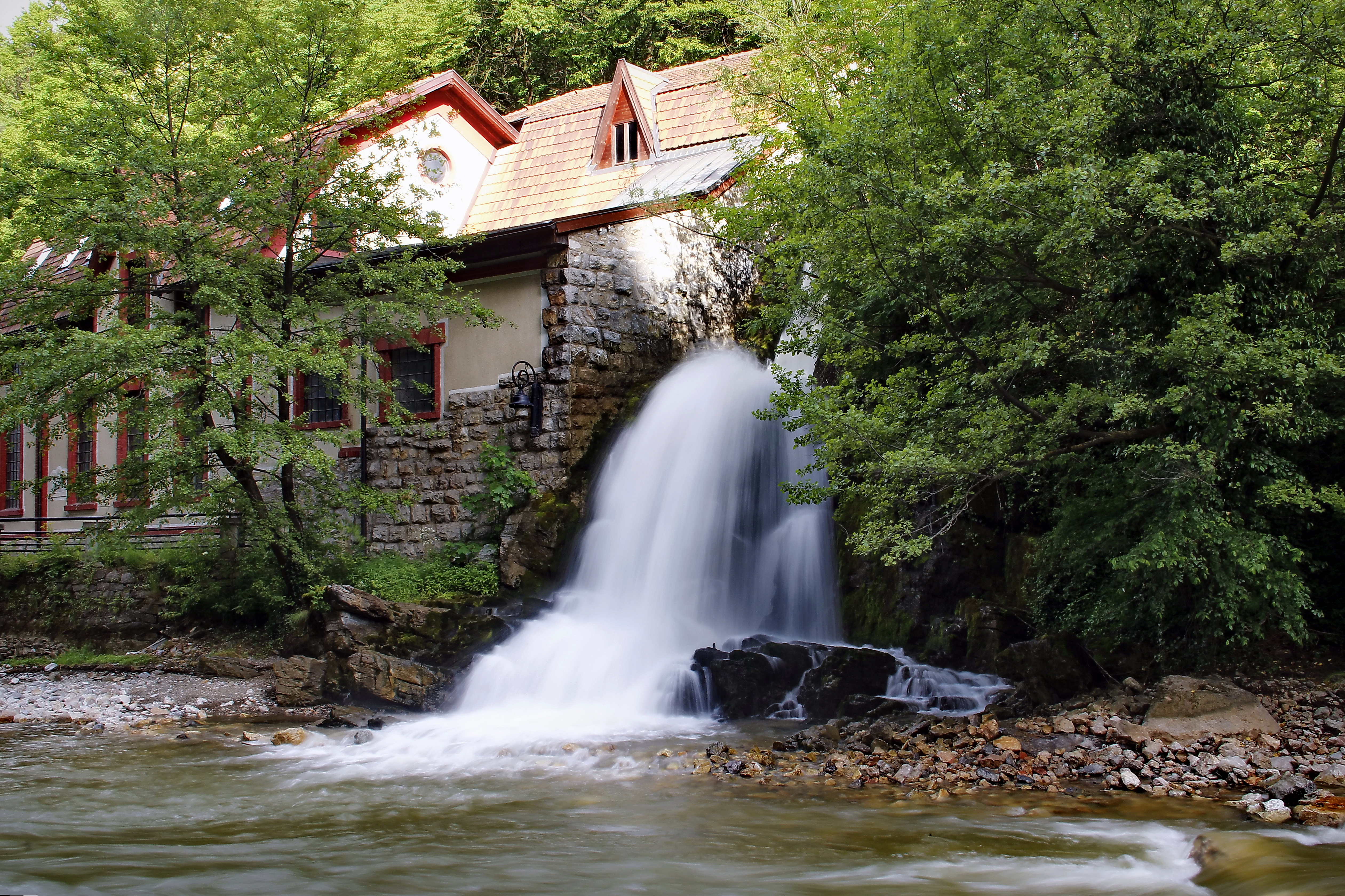 Hidrocentrala na reci Đetinji u Užicu napravljena je 1900. godine i jedan je od simbola ovog grada. To je prva električna centrala podignuta po Teslinim principima polifaznih struja u Srbiji i to svega pet godina posle podizanja iste takve na reci Nijagari u Americi.